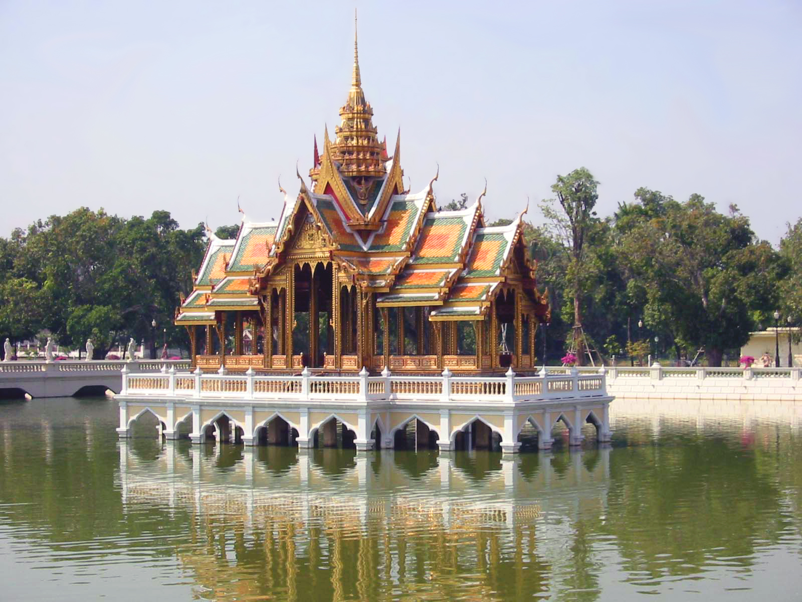 Bang Pa-In floating pavilion in Ayutthaya, Thailand